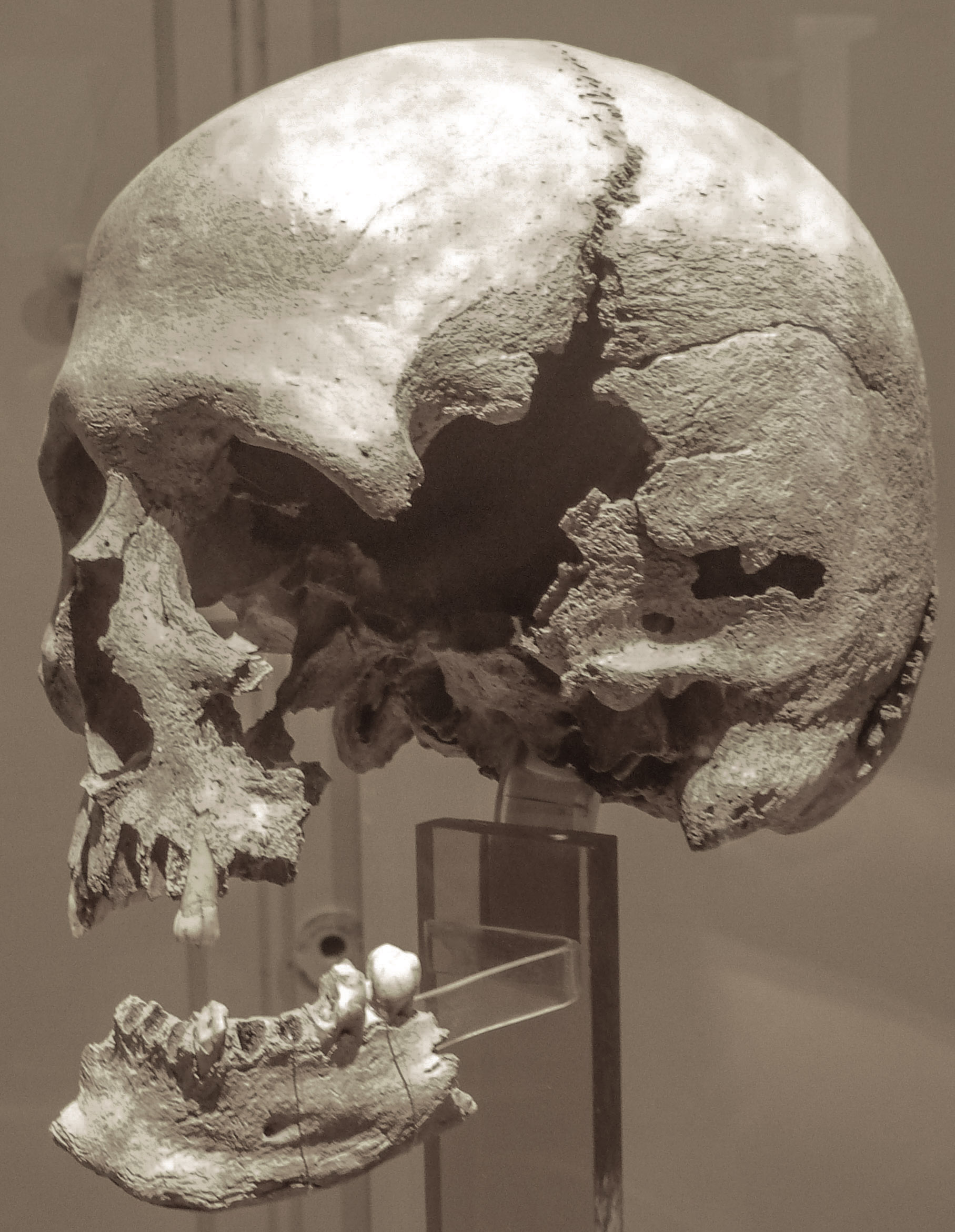 Tête d'homme trouvée sur l'ilôt d'Er Yoc'h, qui dépend de l'île d'Houat (fouille de Zacharie Le Rouzic faite en 1924-1925).